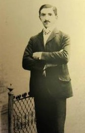 Oldřich Uhlík (1888 - 1964), Český autokarosář.